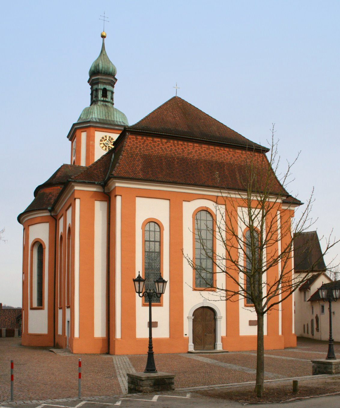 Die katholische Pfarrkirche St. Maria Himmelfahrt in Tiengen (Waldshut-Tiengen, Landkreis Waldshut, Baden-Württemberg)). Die Barockkirche wurde 1753-55 unter teilweiser Verwendung des Vorgängerbaus (Turmunterbau) durch den Baumeister Peter Thumb neu errichtet. Im Bild die Vorderseite mit Hauptportal.